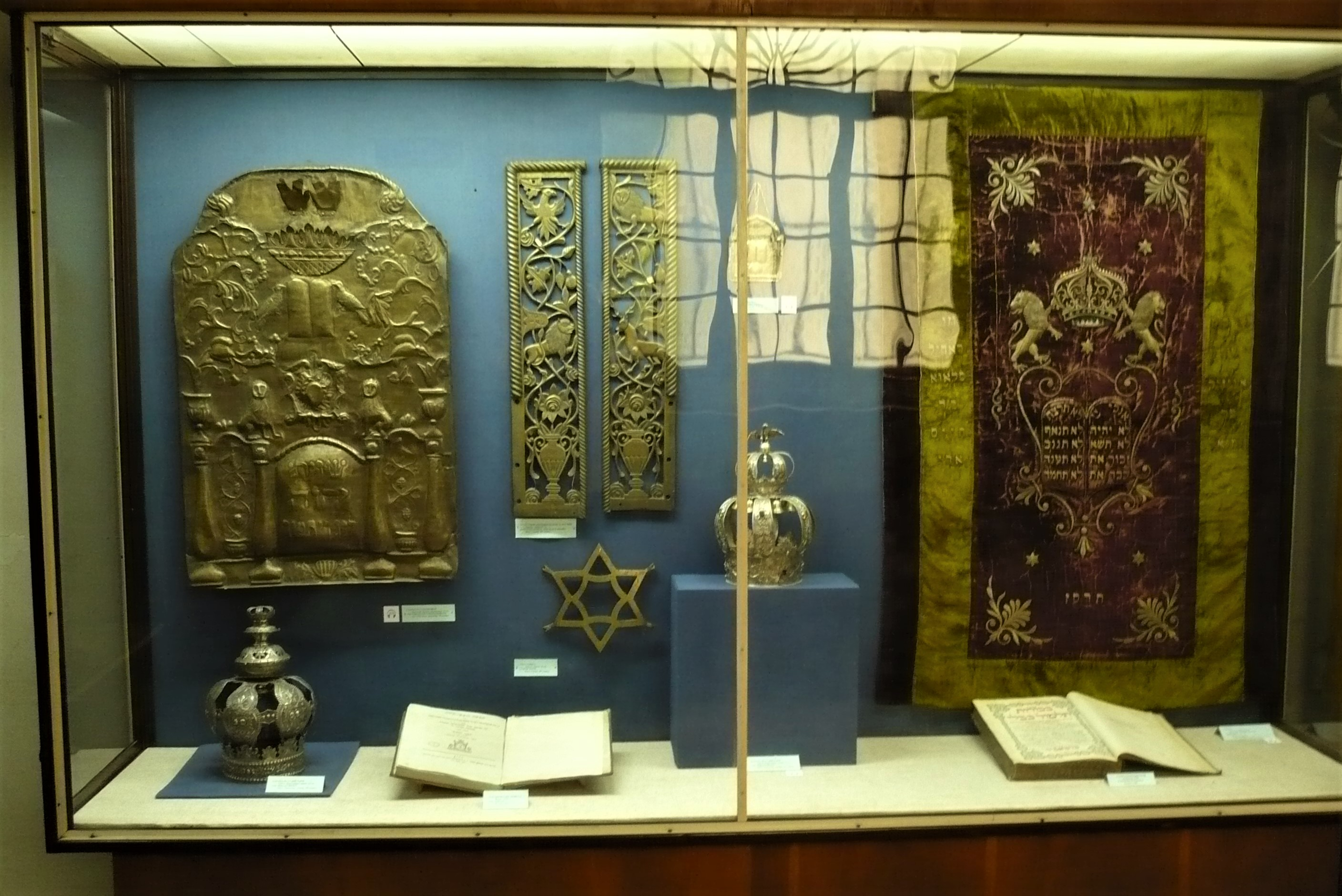 Judaica w Muzeum Religii w klasztorze dominikanów we Lwowie